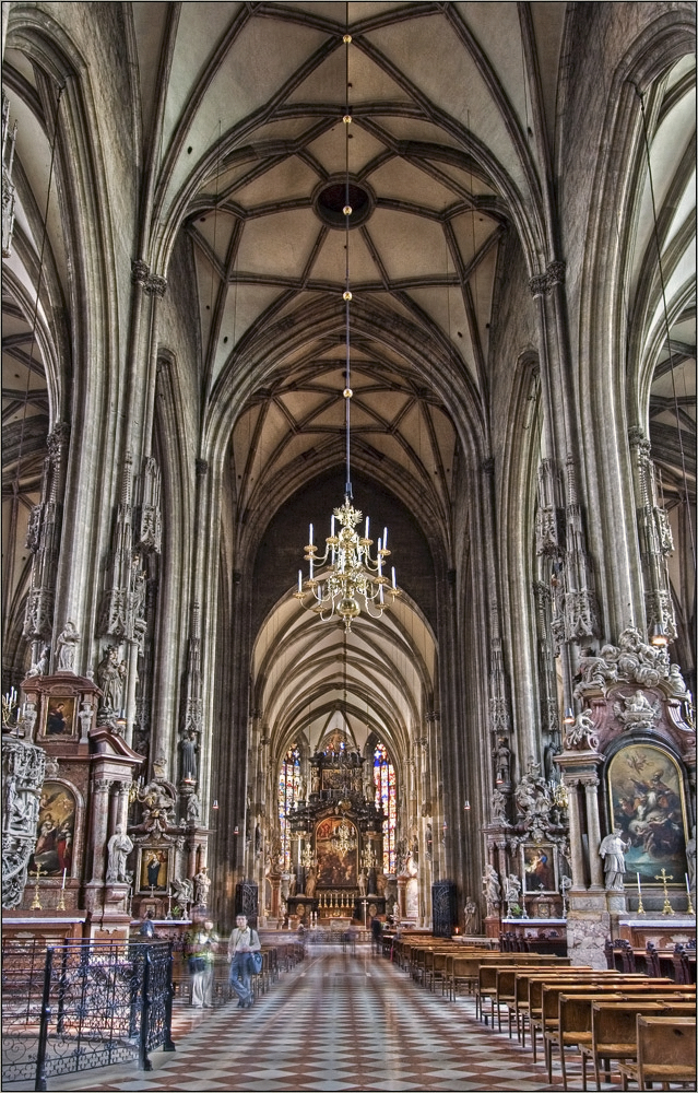 Innenansicht des Stephansdoms